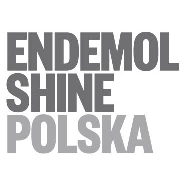 Logo polskiego oddziału Endemol Shine